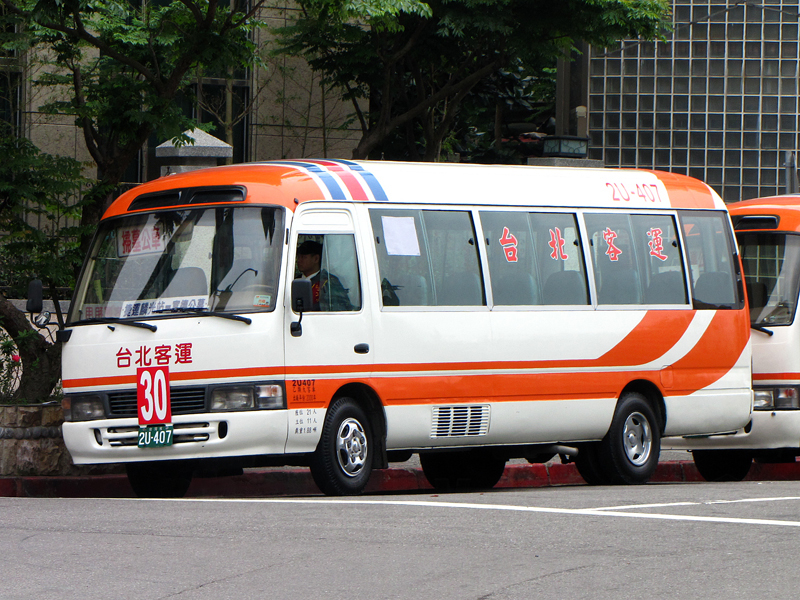 台北客運豐田Coaster小巴士2U-407。